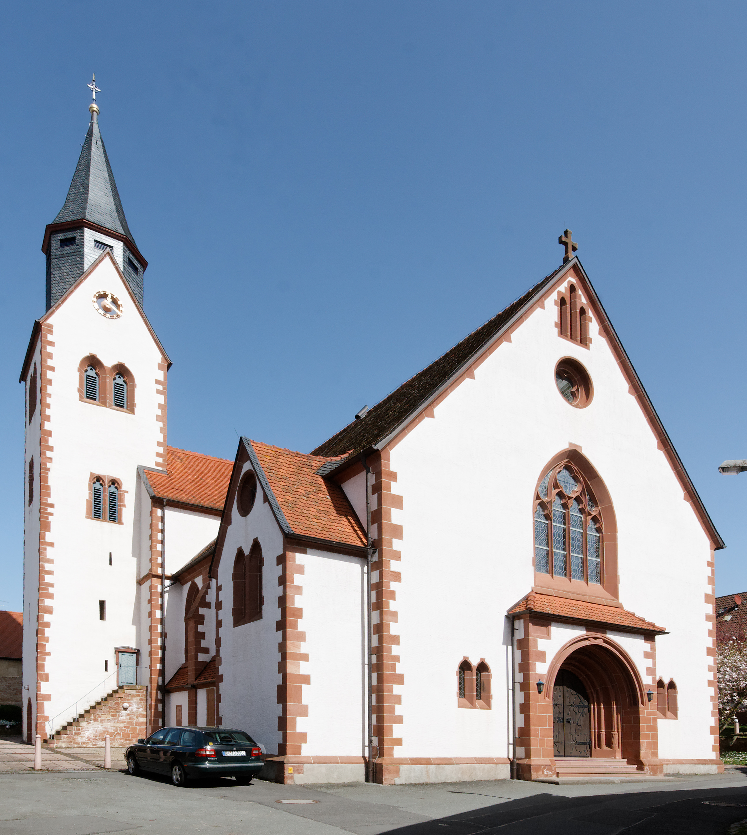 Kirche St. Johannes Baptist (Johanniterkirche) in Mosbach, einem Ortsteil der Gemeinde Schaafheim (Hessen). Die ursprüngliche Kirche wurde um 1250 von den Johannitern erbaut. Das Langhaus stammt aus dem Jahr 1906.